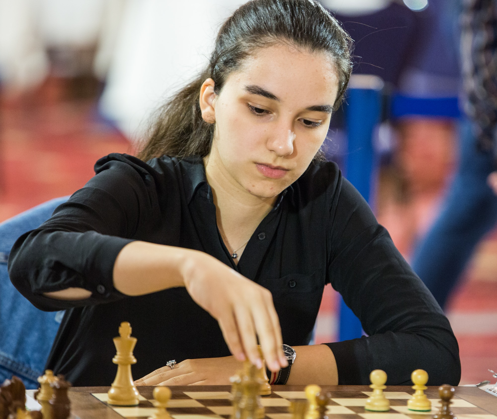 Гунай Маммадзада, фото Марии Емельяновой с командного чемпионата Европы на Крите